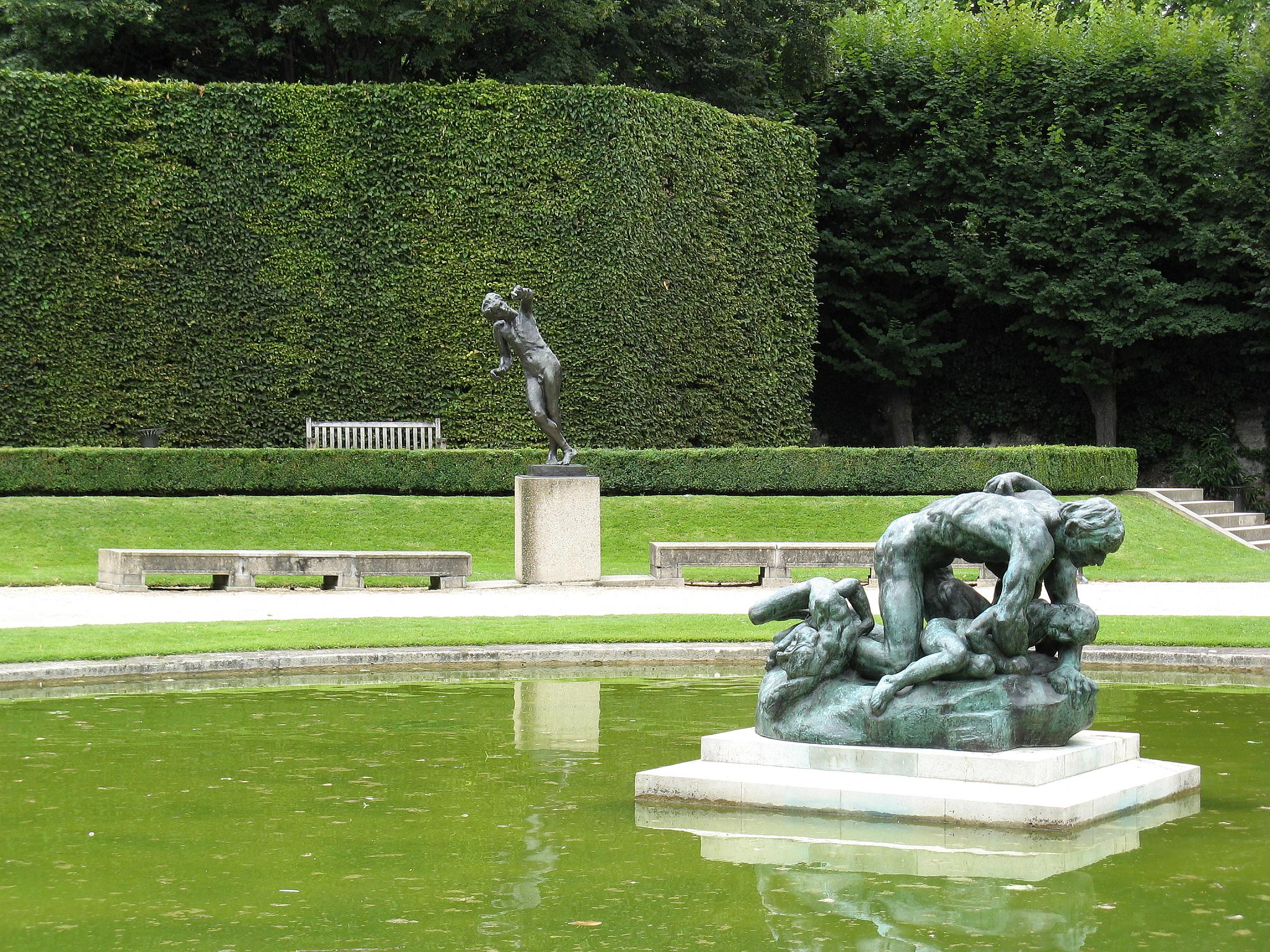 Jardin du Musée Rodin